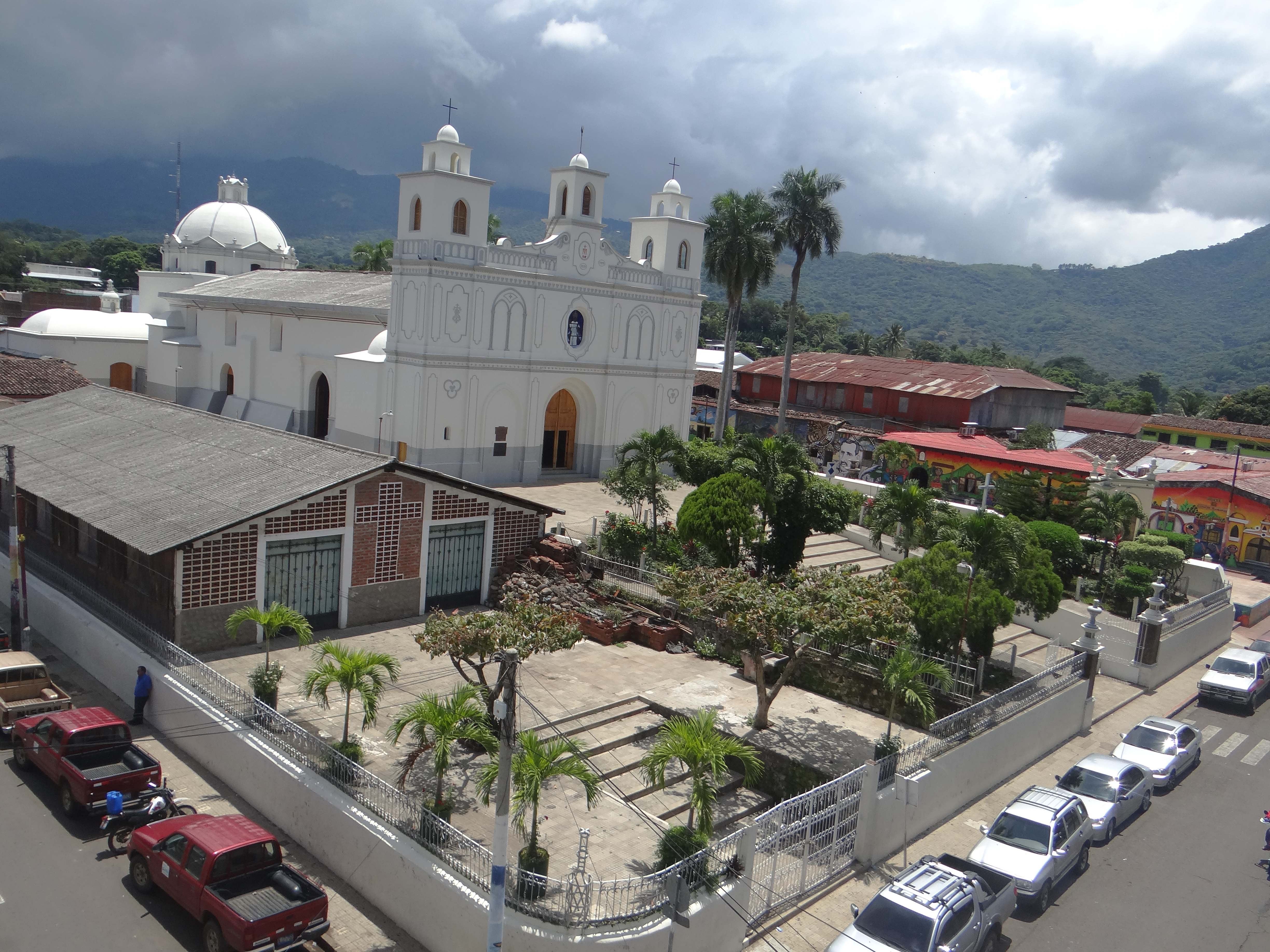 Hola, esta es una parroquia muy representativa de la buena arquitectura de El Salvador, donde no solo existe un monumento mas sino también un lugar en el cual muchas personas llegan a platicar con nuestro creador Dios, un lugar que transmite paz y amor. Visitado por muchos turistas y especialmente por las personas de dicho lugar.